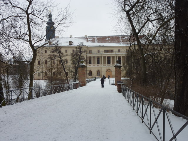 Weimar im Winter 2010